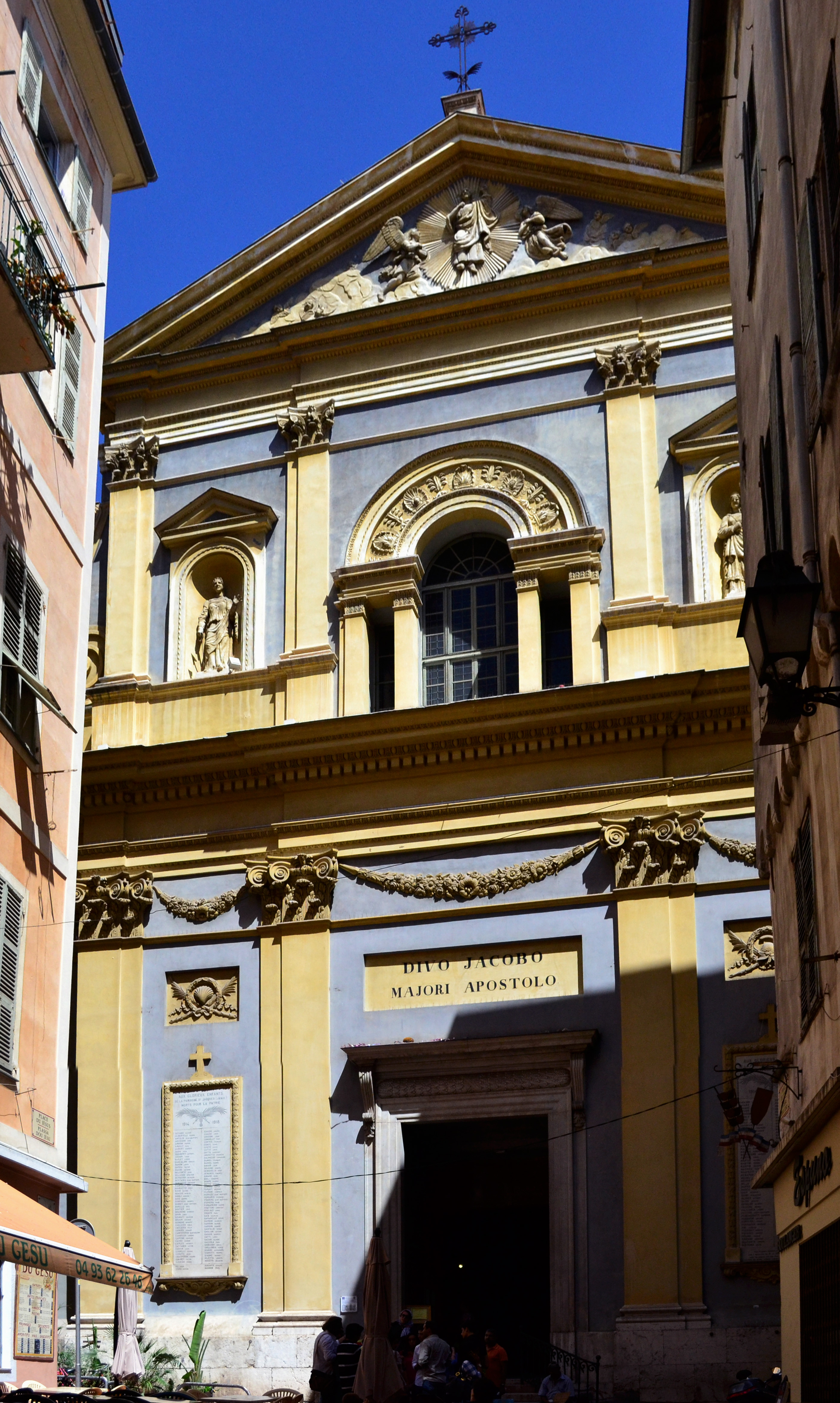 Église Saint-Jacques-le-Majeur de Nice